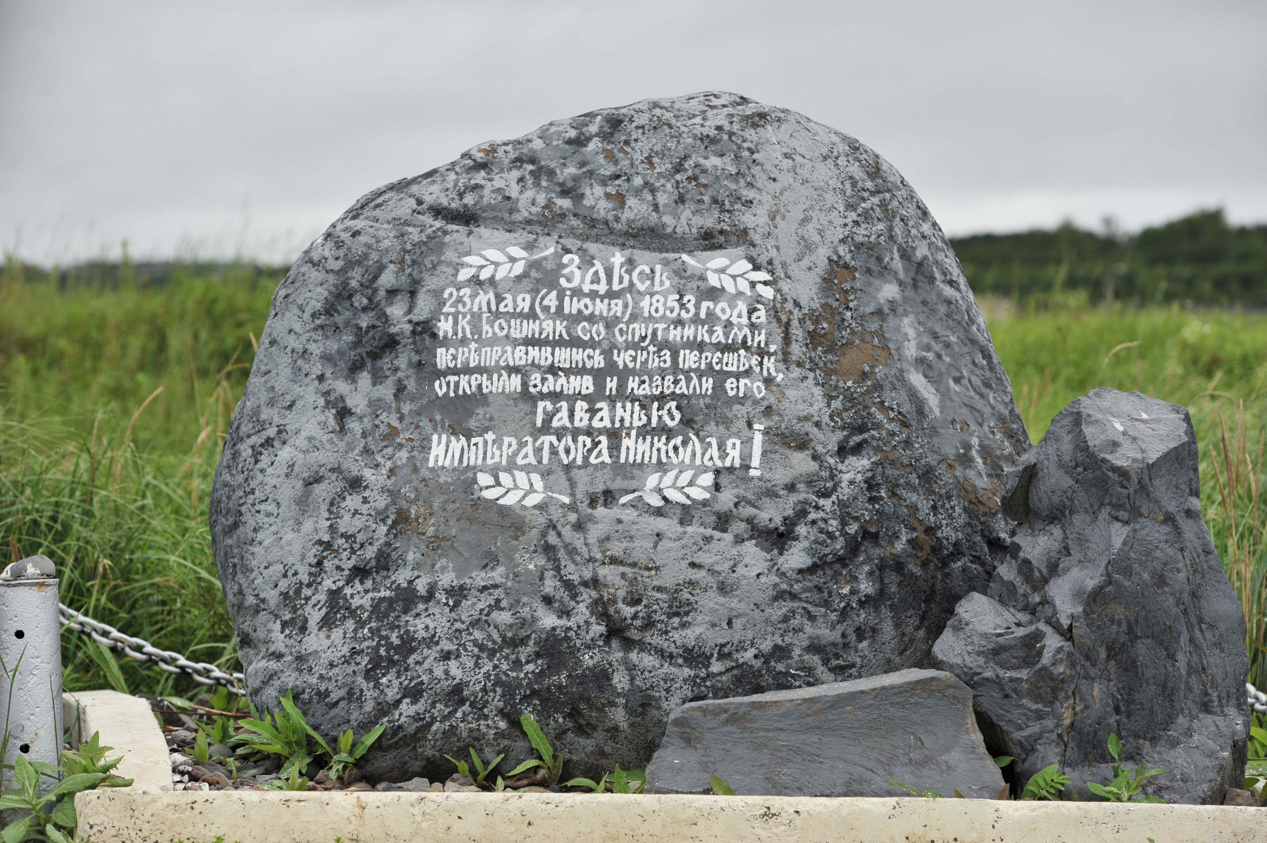 Памятный камень в Императорской гавани